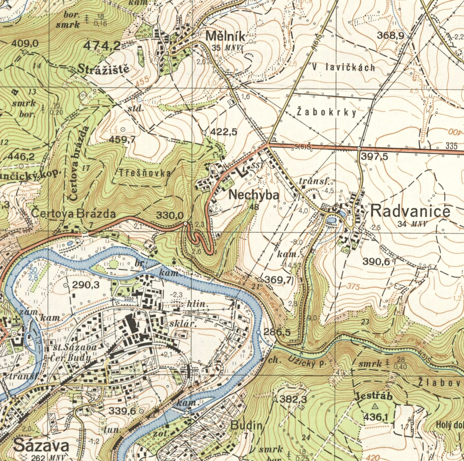 Nechyba na topografické mapě 1:25 000 z roku 1956. Mapováno 1955. Výřez z mapového listu M-33-78-B-d.